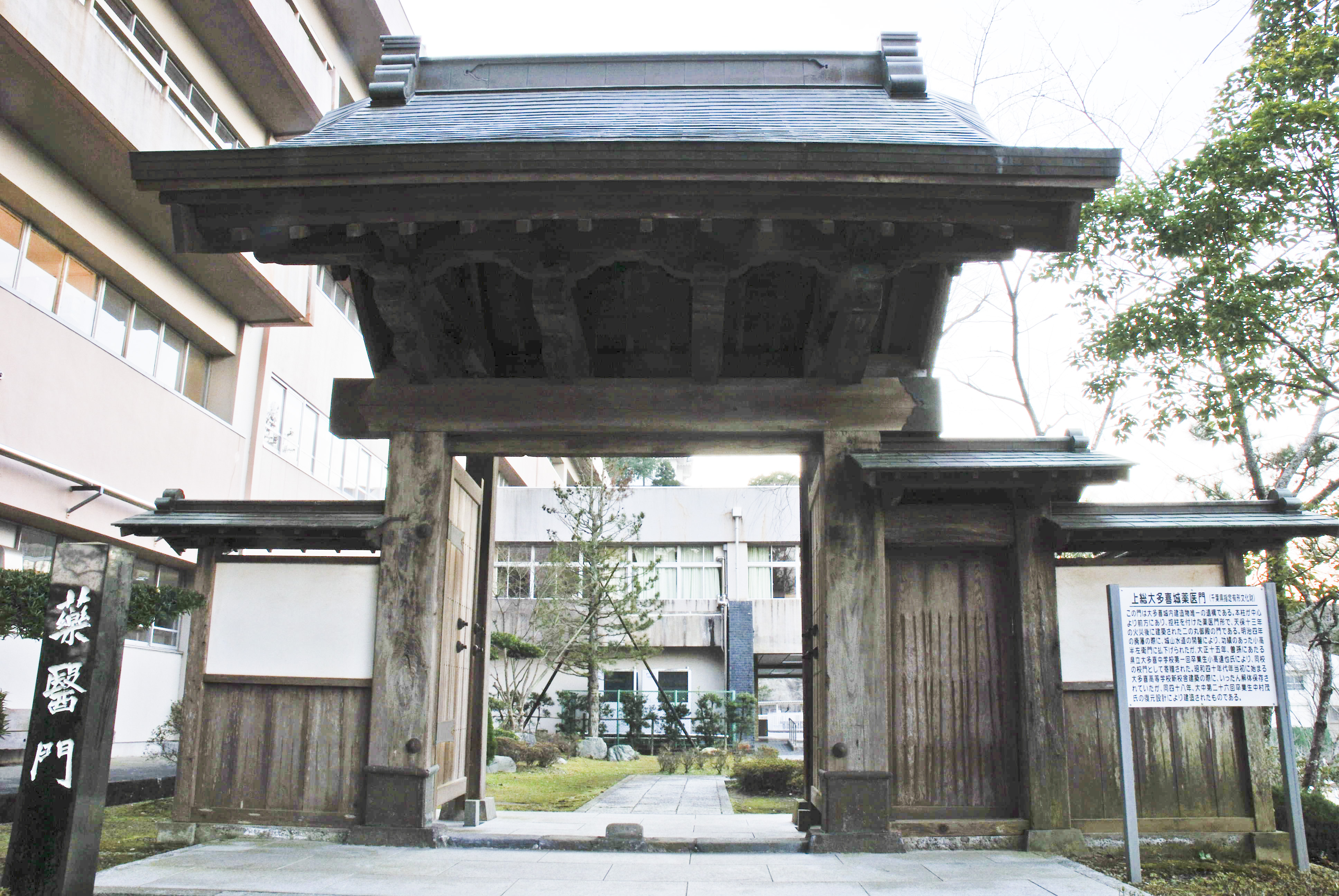 Otaki castle yakuimon